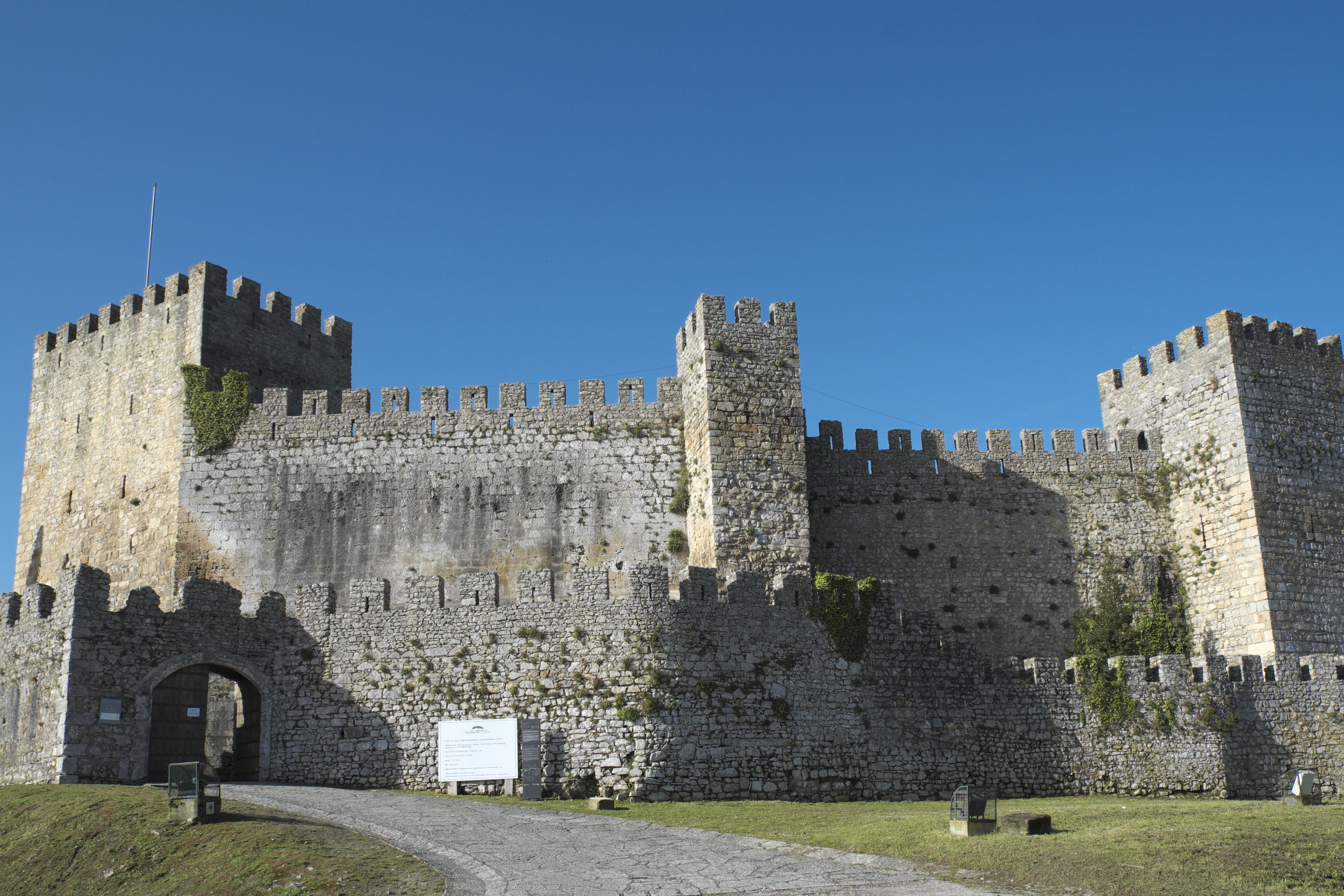 Burg (Castelo de Montemor-o-Velho) in Montemor-o-Velho im Distrikt Coimbra in Portugal